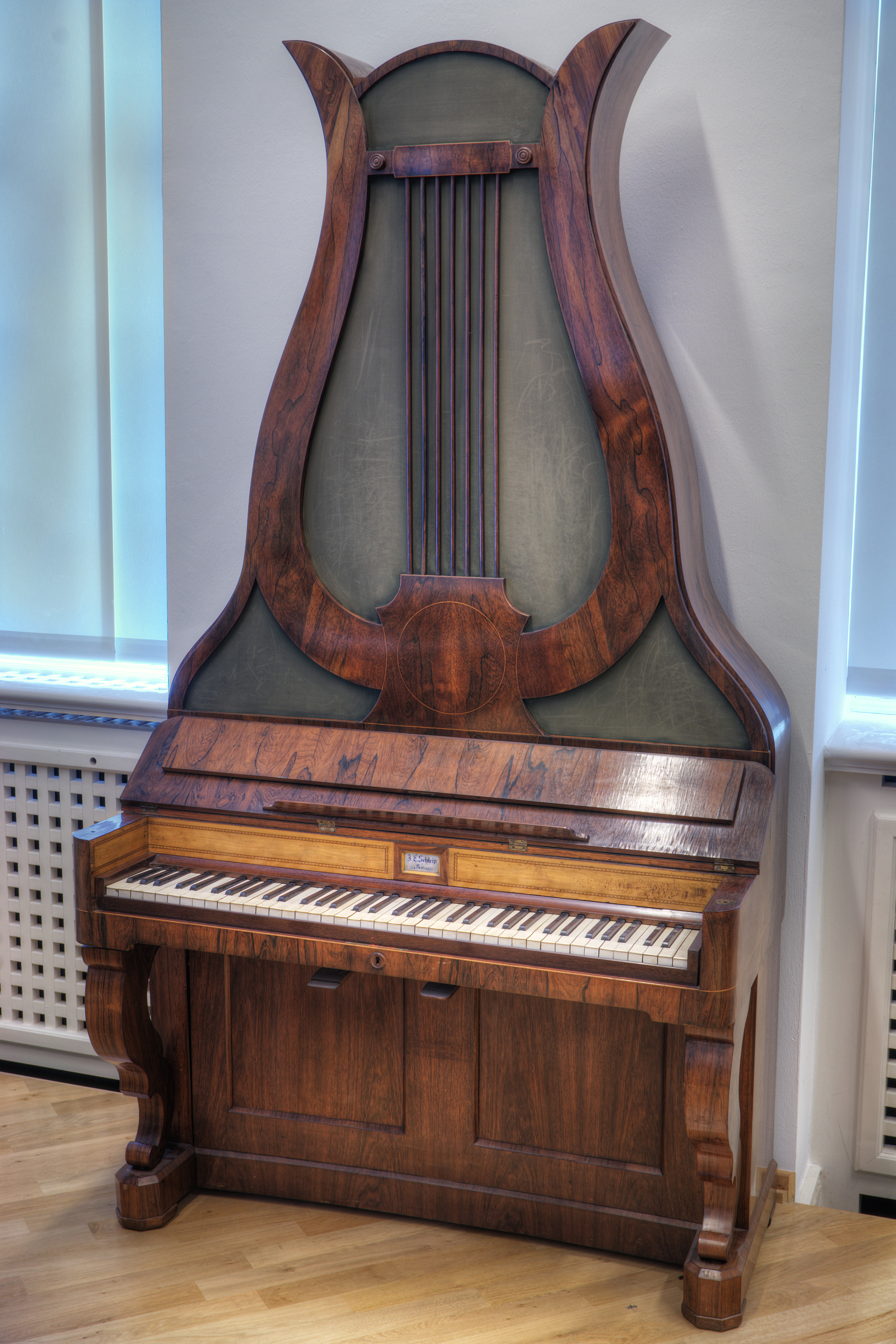 Johann Christian Schleip erbaut. Diese sonderbare Form diente der Platzersparnis. Der Flügel hat einen Umfang von F1 bis f4 und besitzt zwei Kniehebel für Forte und Verschiebung. Fotografiert im Museum für Hamburgische Geschichte, Hamburg, Deutschland.